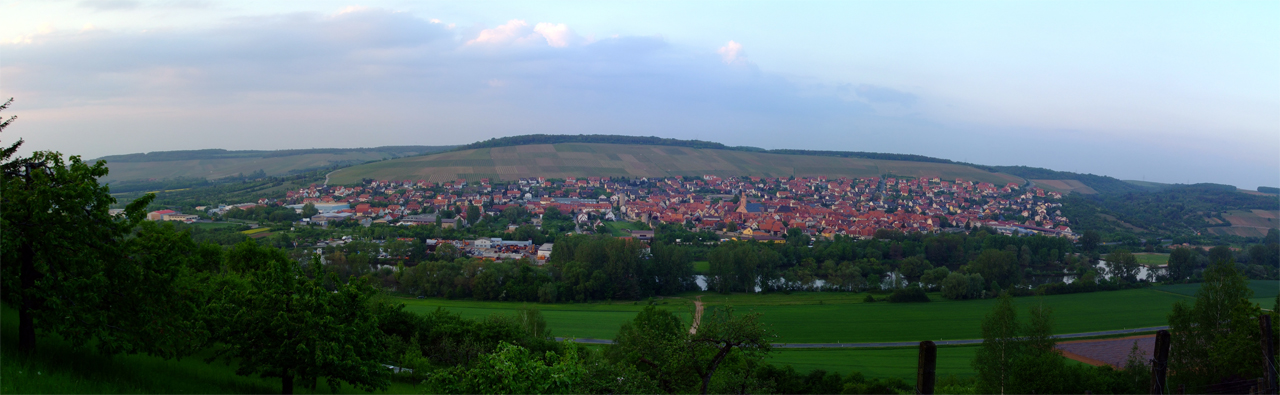 Eibelstadt von der gegenüberliegenden Mainseite aus fotografiert Uhrzeit: 20:24